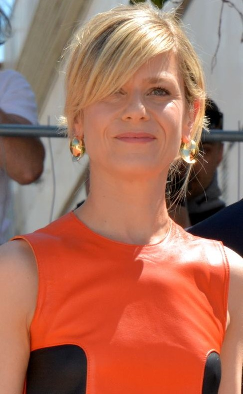 Marina Foïs au festival de Cannes